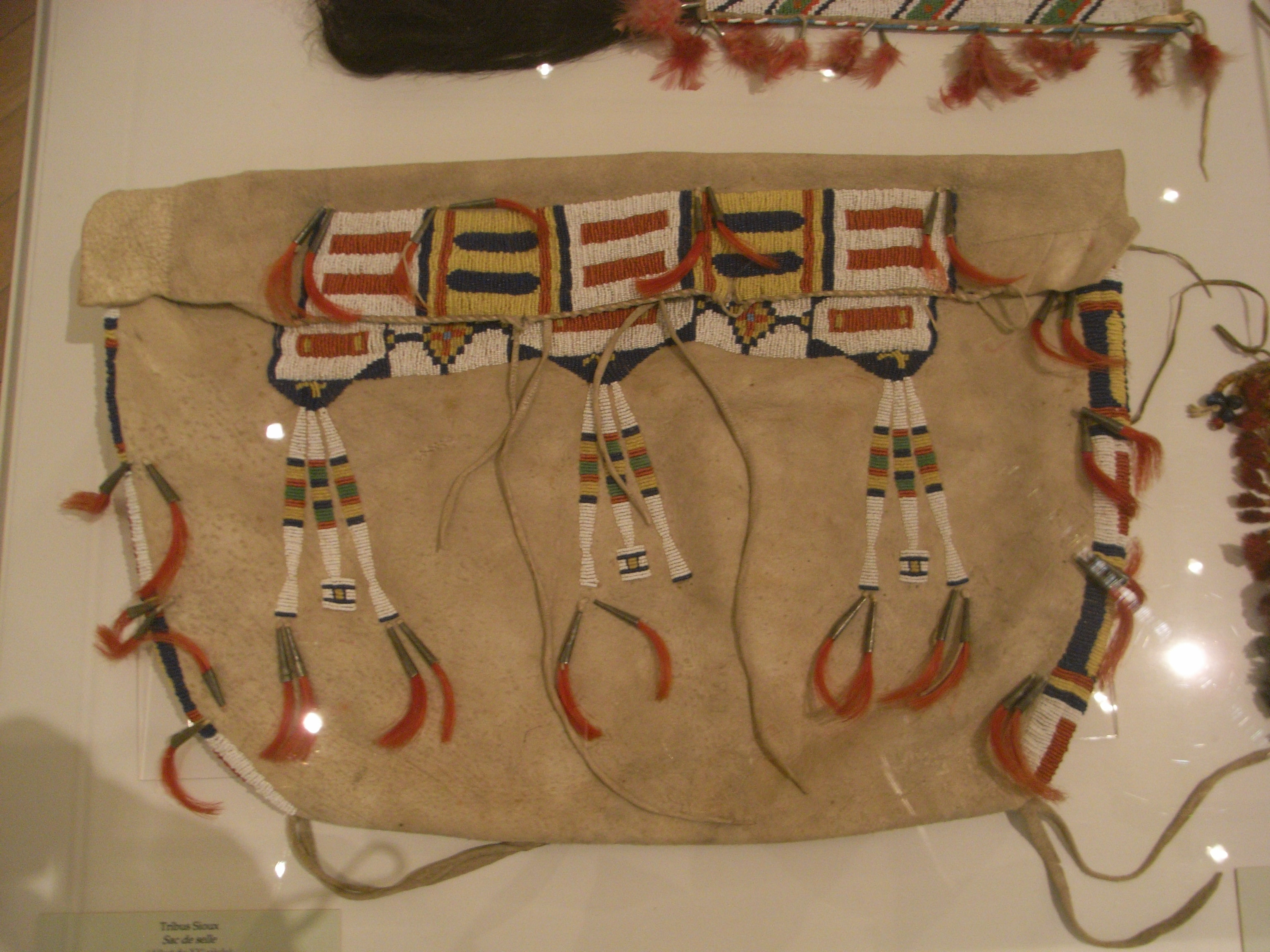 Sac de selle de la tribu Sioux - Musée du Nouveau Monde à La Rochelle (Charente-Maritime - France)